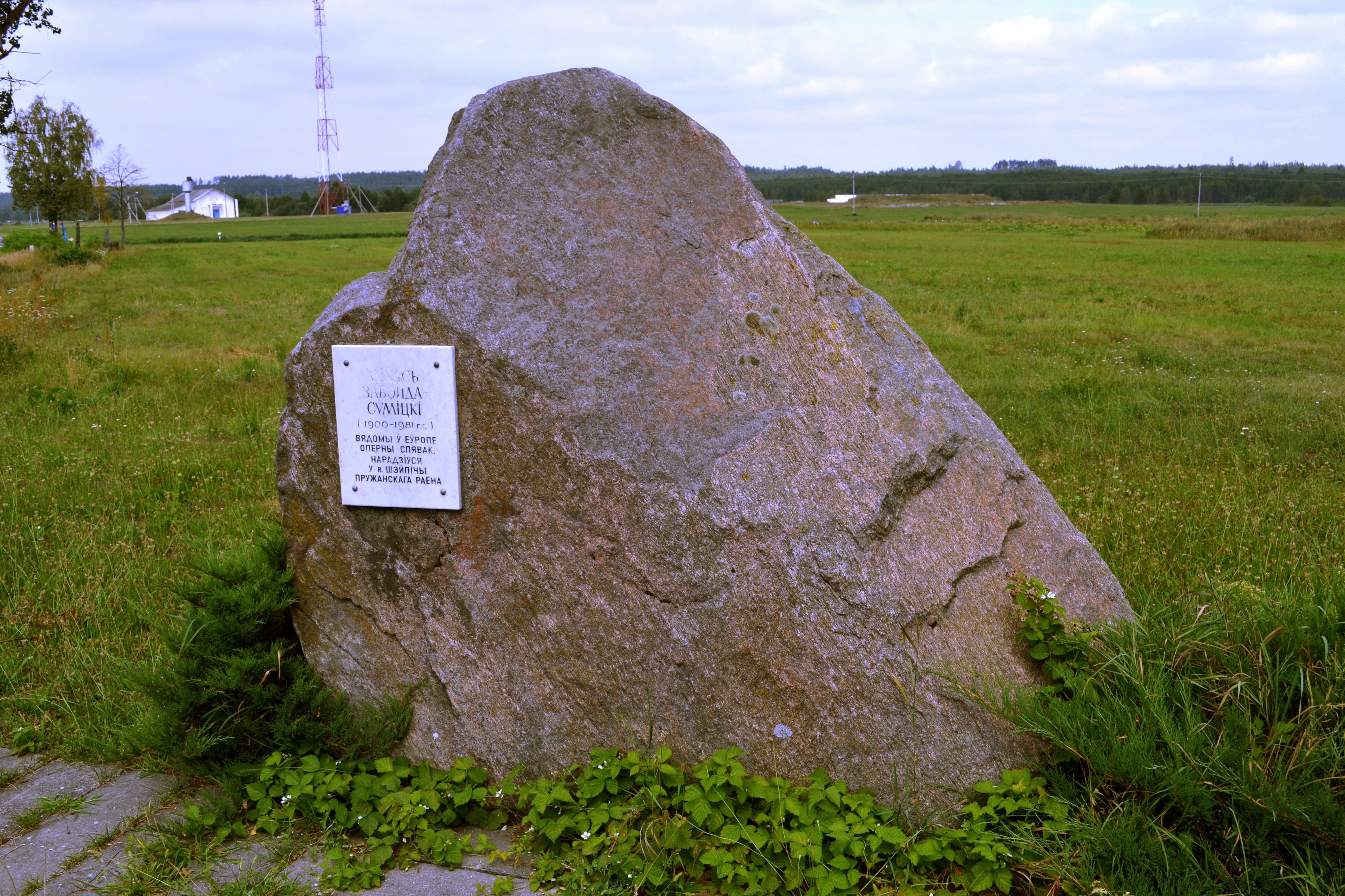 Месца, дзе нарадзіўся Міхась Забэйда-Суміцкі